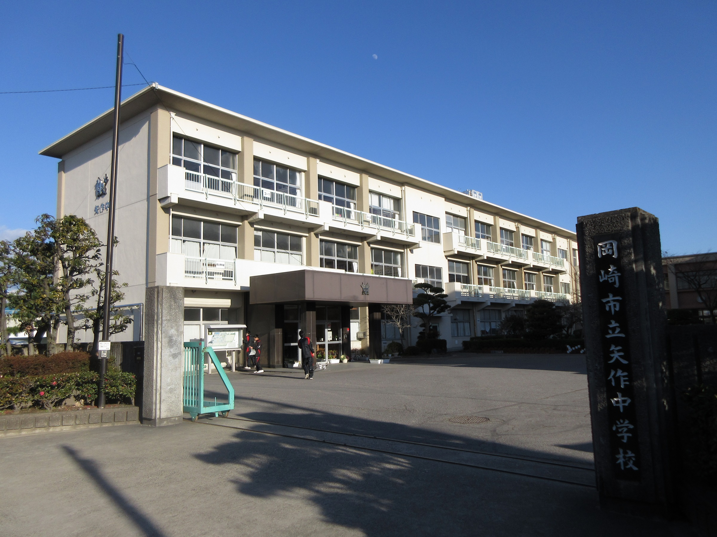 岡崎市立矢作中学校（岡崎市暮戸町）